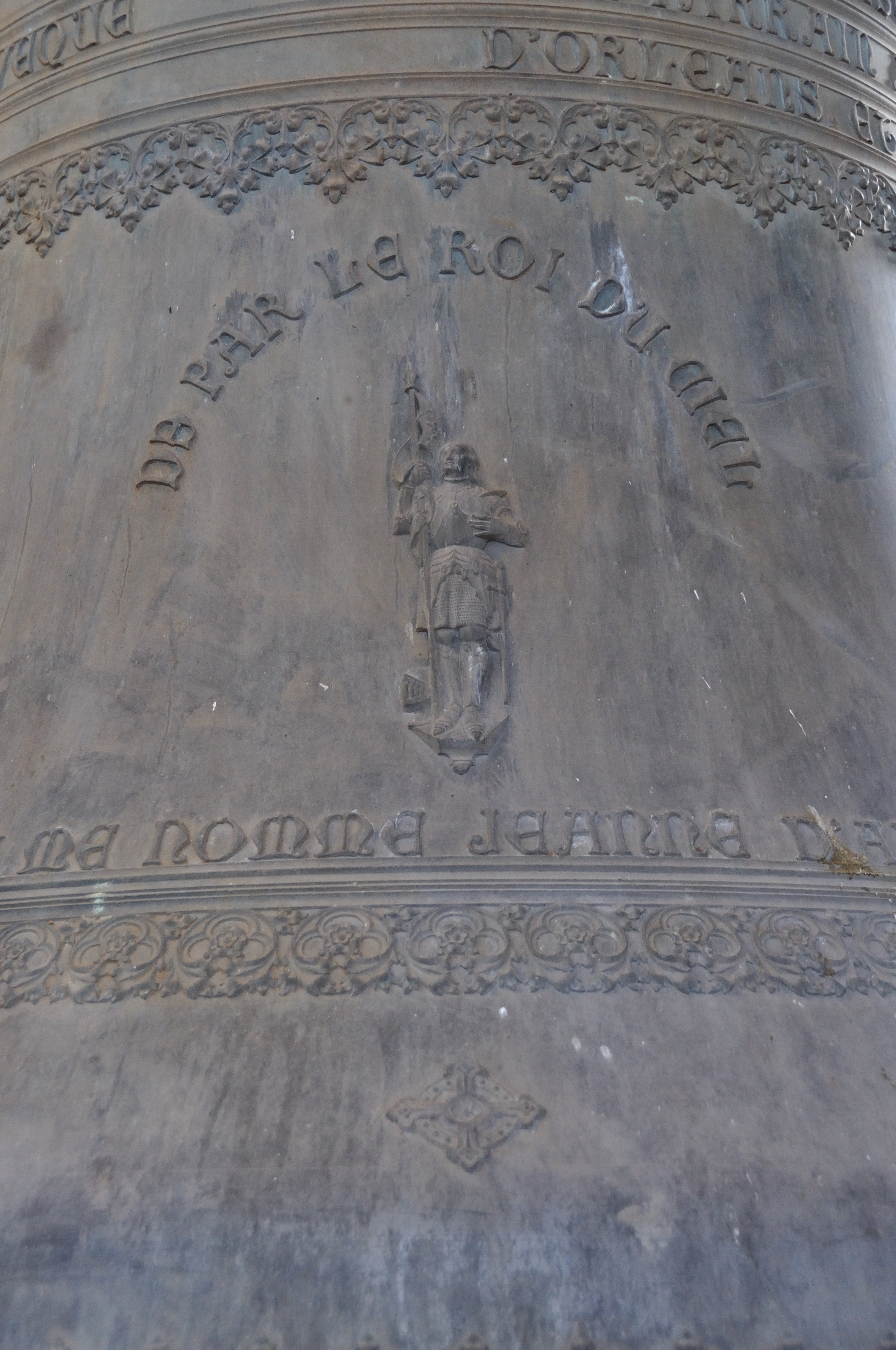 Bourdon de la cathédrale Sainte-Croix d'Orléans, appelé La Pucelle. Il remplace en 2012 une cloche félée lors de la Seconde Guerre mondiale.